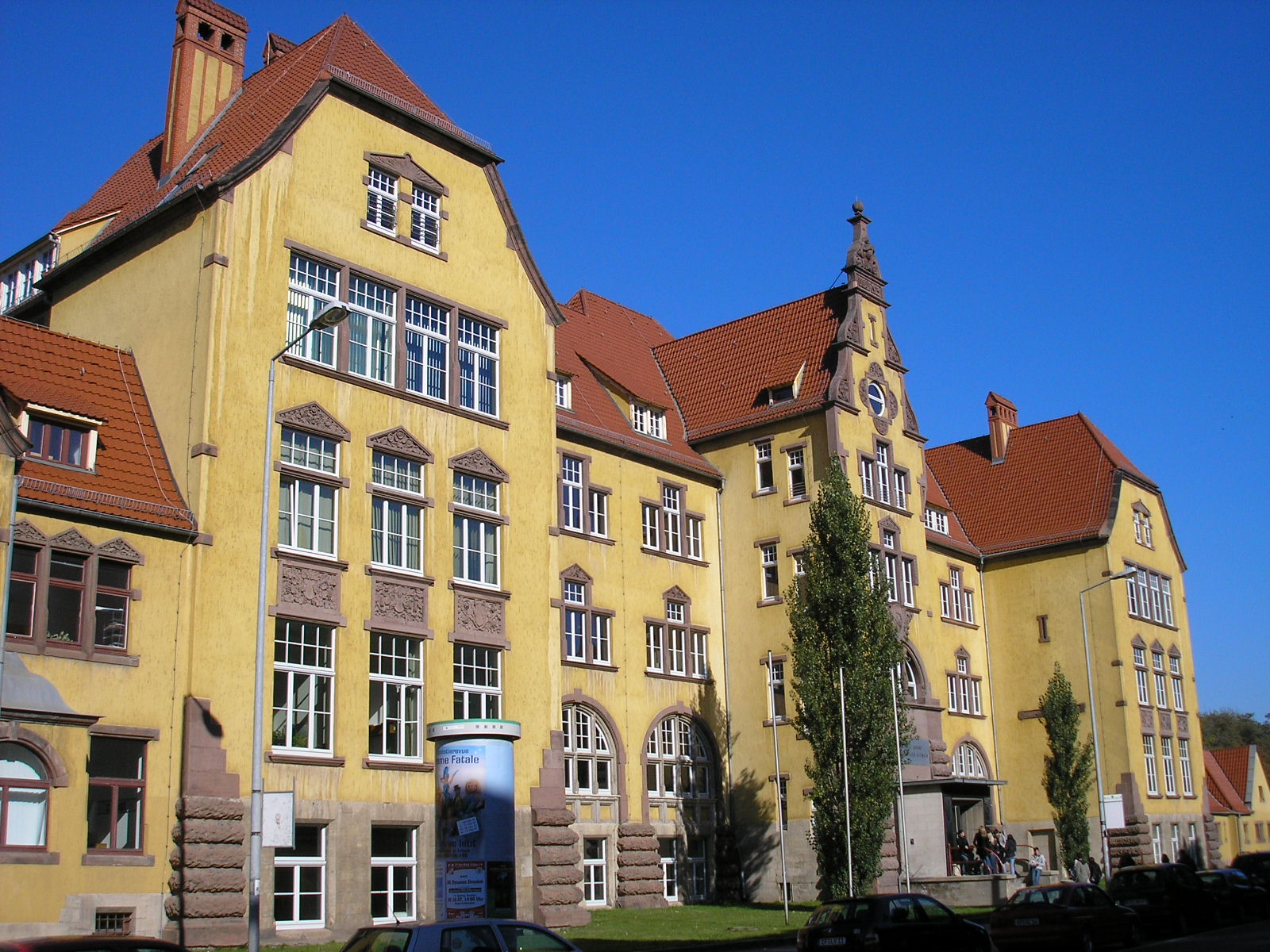 Die ehemalige preußische Bauschule in Erfurt, heute Fachbereich Architektur der FH.